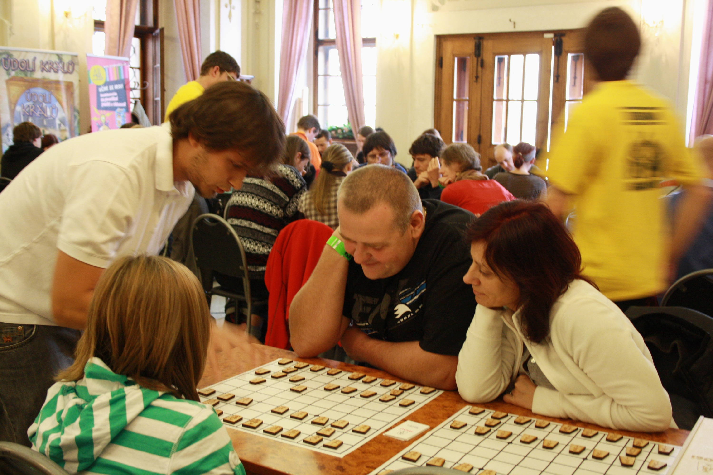 Deskohraní 2012 - demonstrace hry šógi (japonské šachy)